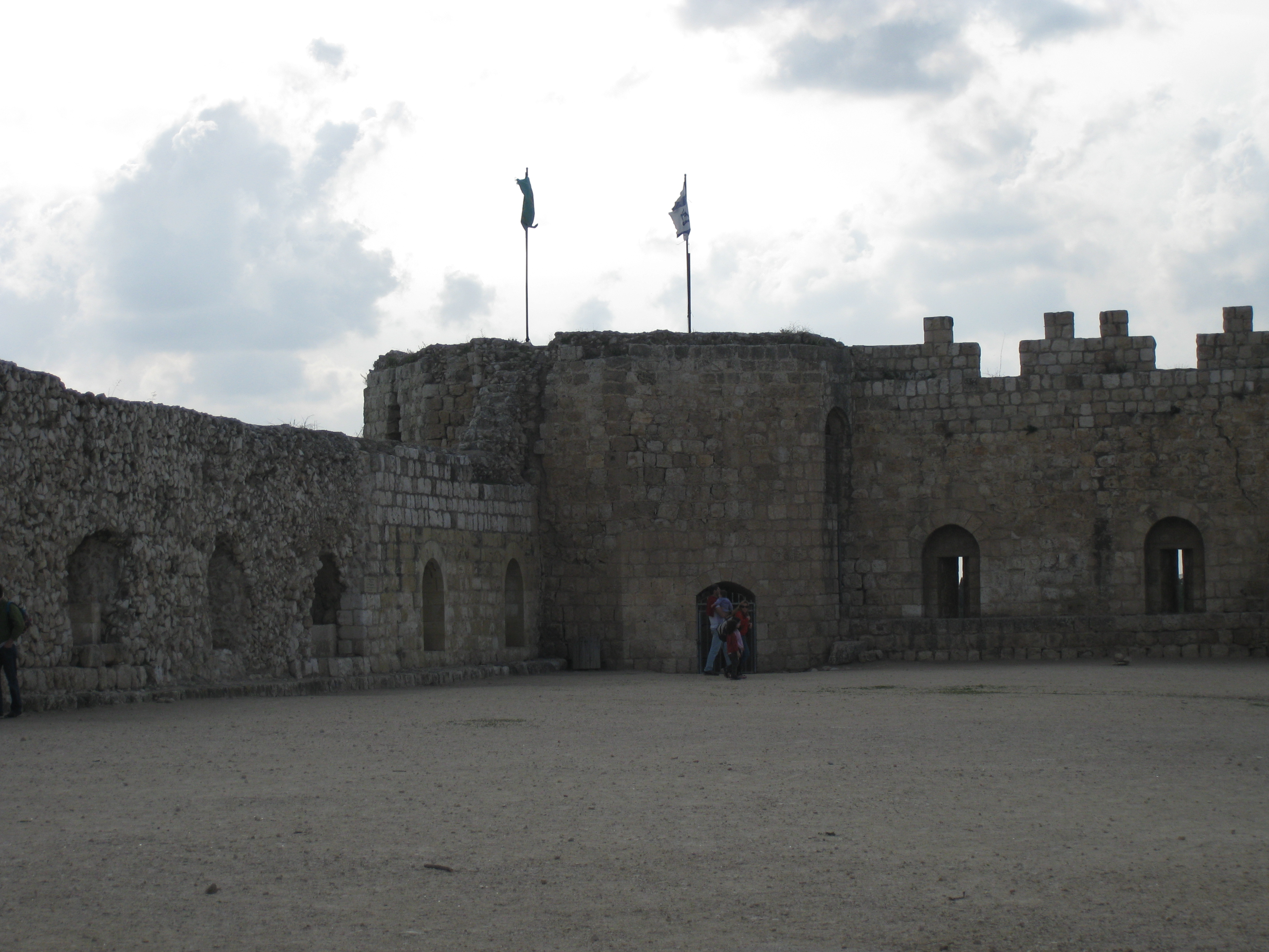 Tel Afek תל אפק גן לאומי ירקון